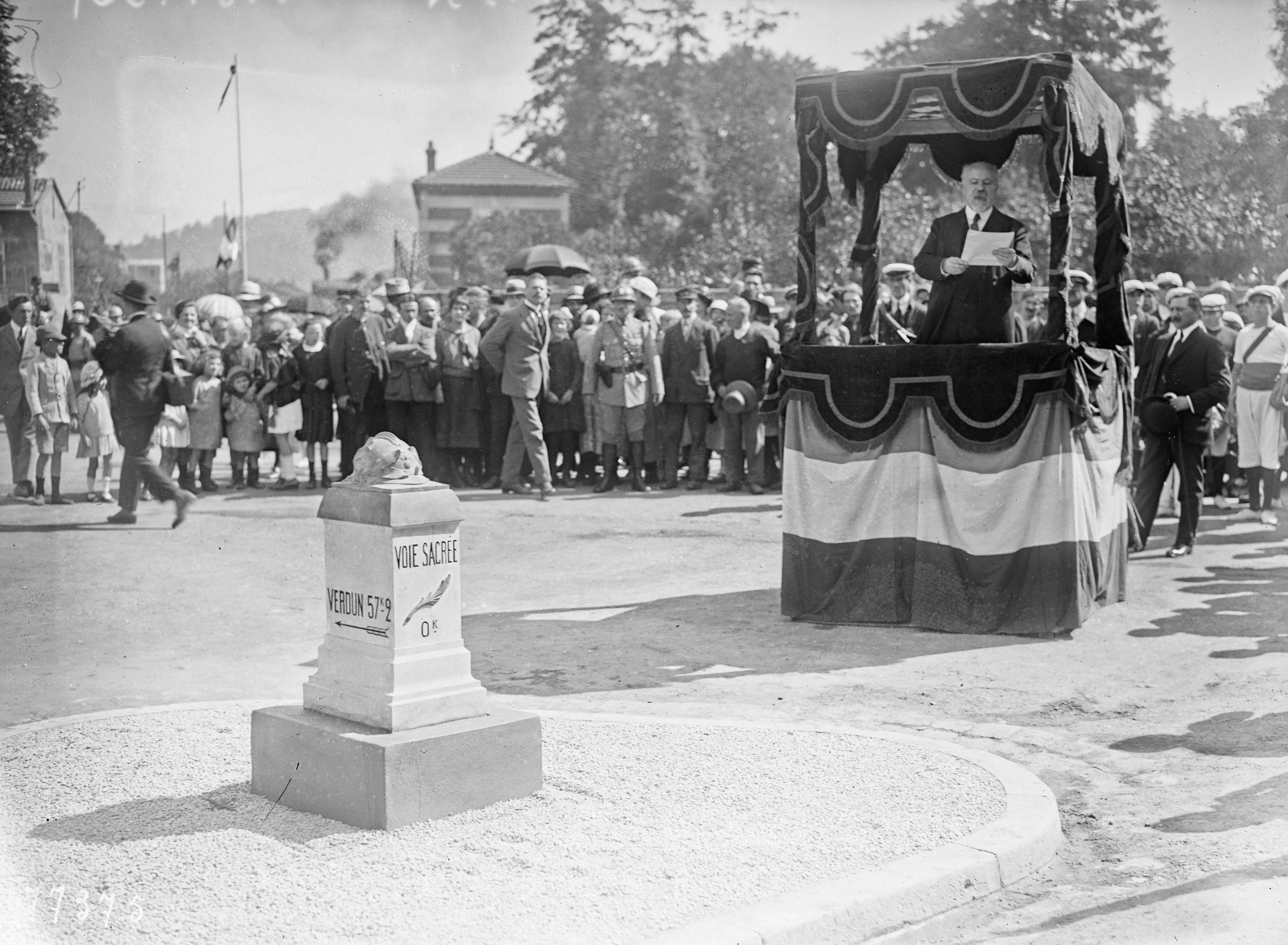 Inauguration de la Voie sacrée, discours de M. Poincaré. 21-08-1922, Bar-le-Duc.